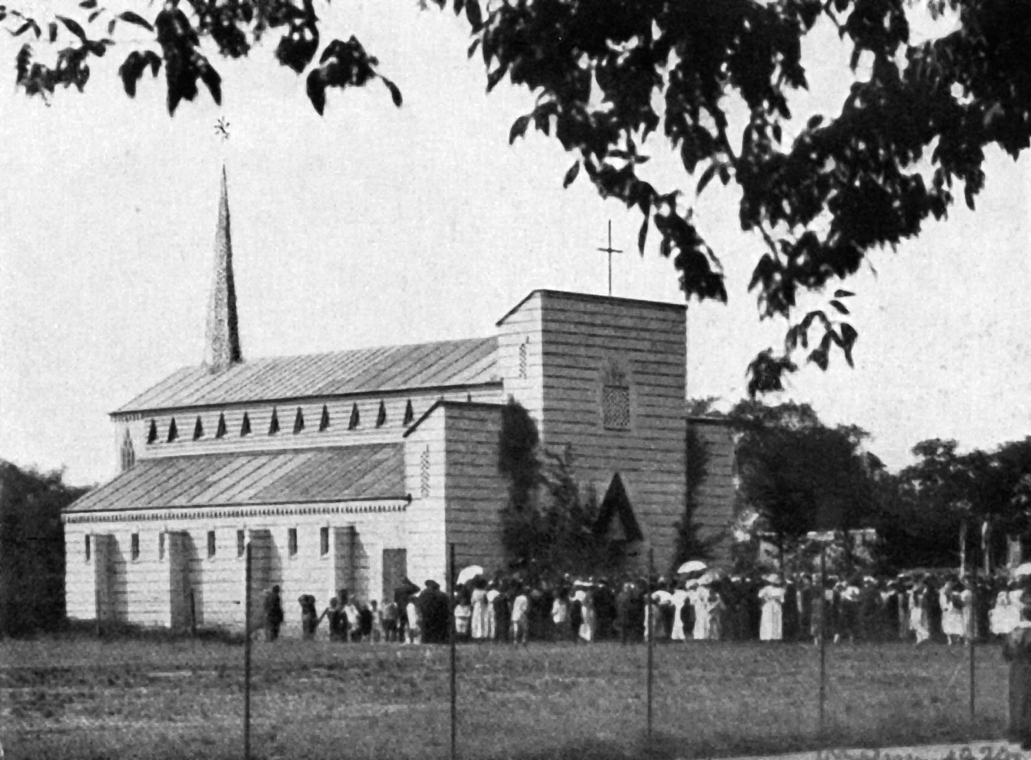 Notkirche St. Josef, Offenbach am Main, erbaut 1914-1920. Architekt: Dominikus Böhm